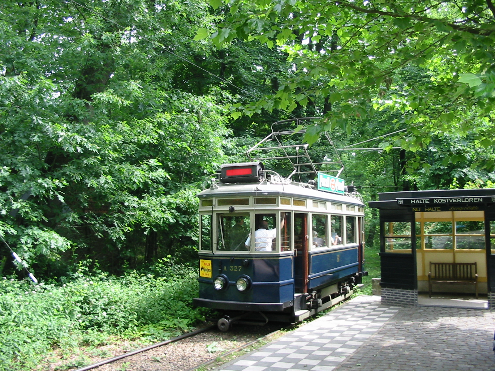 NZH-motorrijtuig A327 vertrekt op zondag 18 juni 2006 van de voormalige NZH-halte Kostverloren (nu halte Dingeliefde) in het Openluchtmuseum te Arnhem.